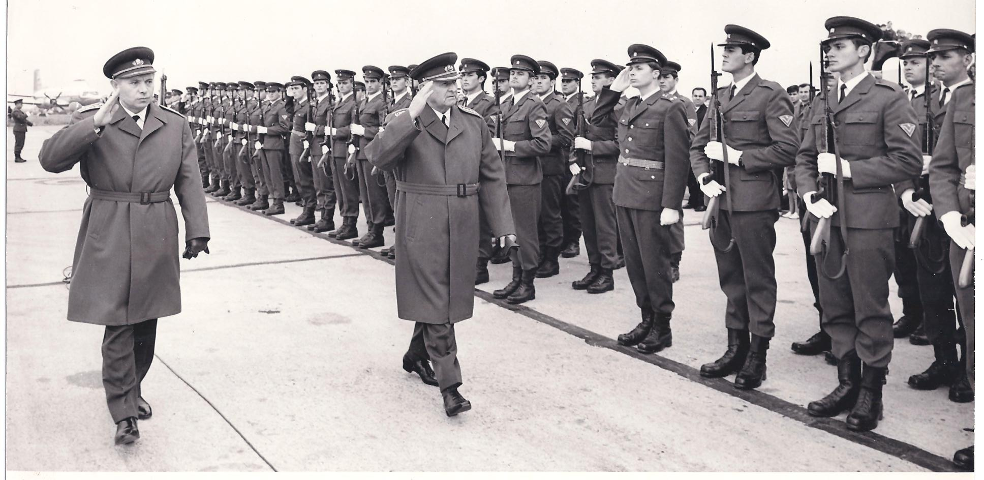 Vojaci novovytvorenej čestnej stráže (od apríla 1969), bratislavskej posádky v 1969 roku vítajú prezidenta ČSSR Ludvíka Svobodu s doprovodom ministra národnej obrany Martina Dzúra